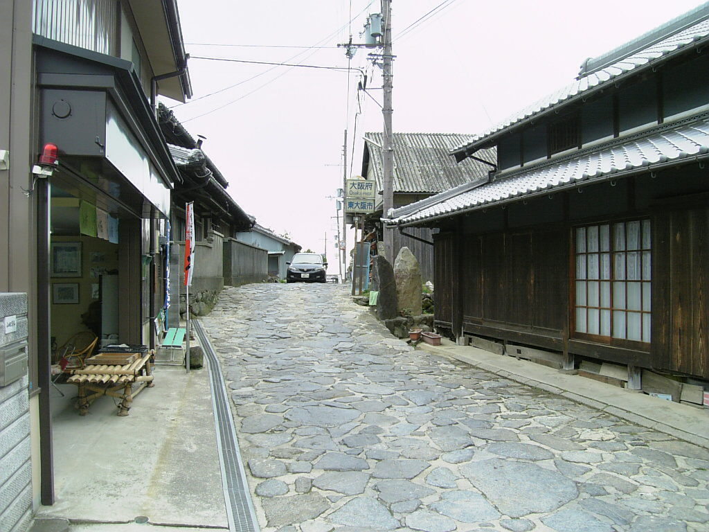 暗峠 大阪府/奈良県境付近から大阪方面を望む。